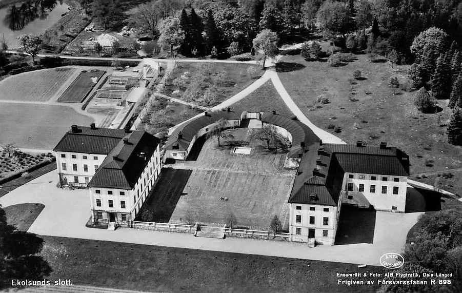 Ekolsunds slott från luften